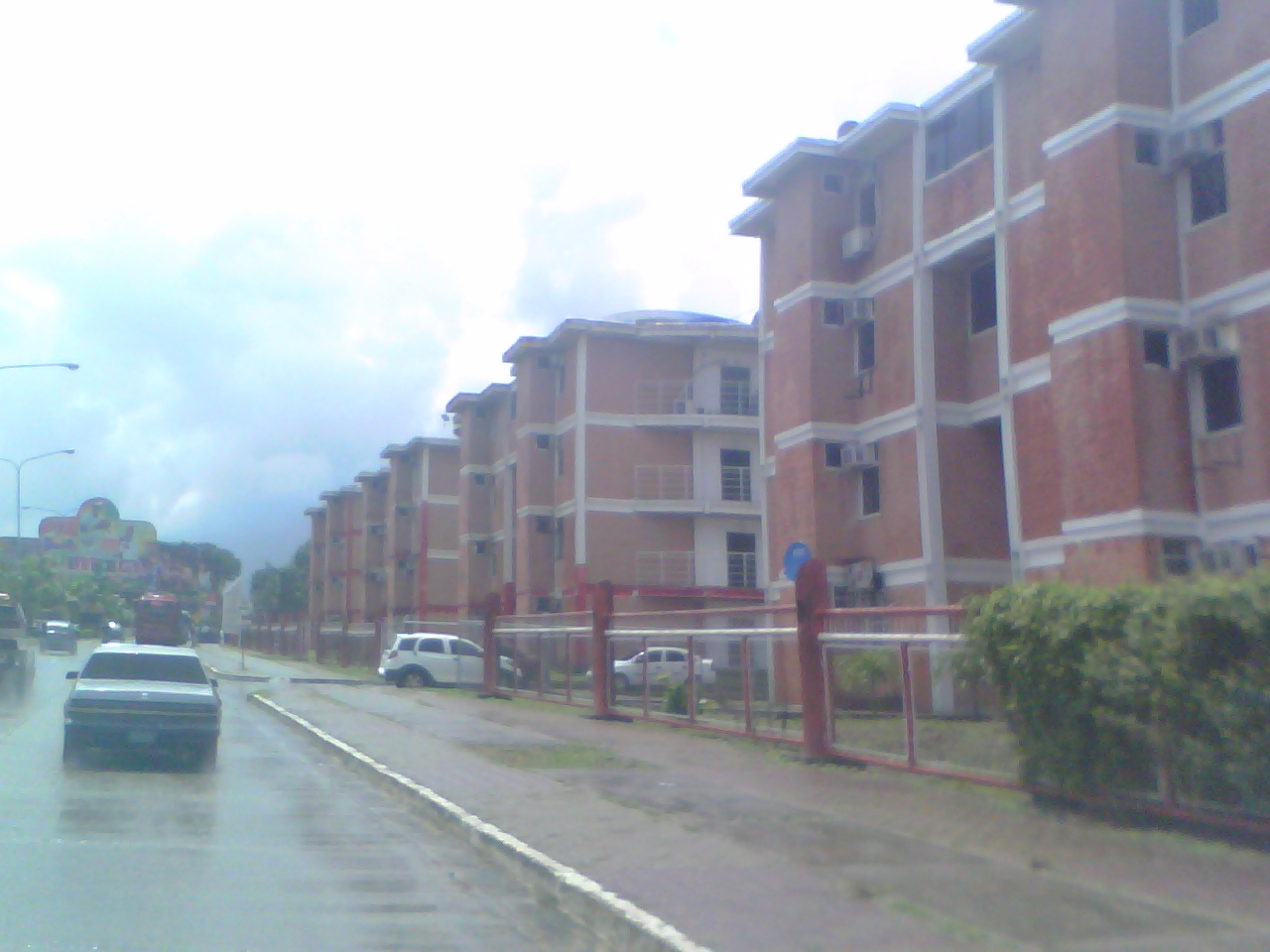 las residencias de la ciudad olímpica